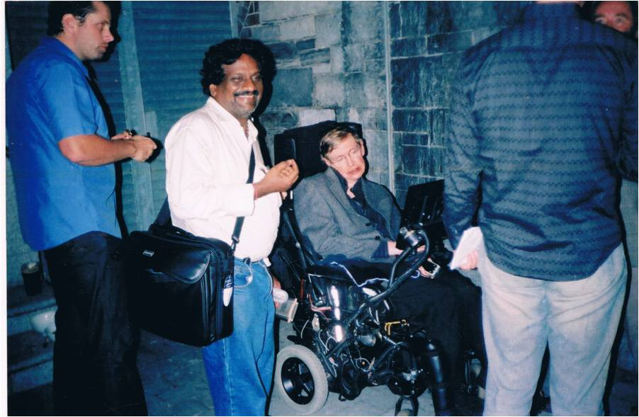 ప్రకుఖ శాస్త్రవేత్త స్టీఫెన్ హాకింగ్స్ తో ఎస్.ఎన్.పి.గుప్తా